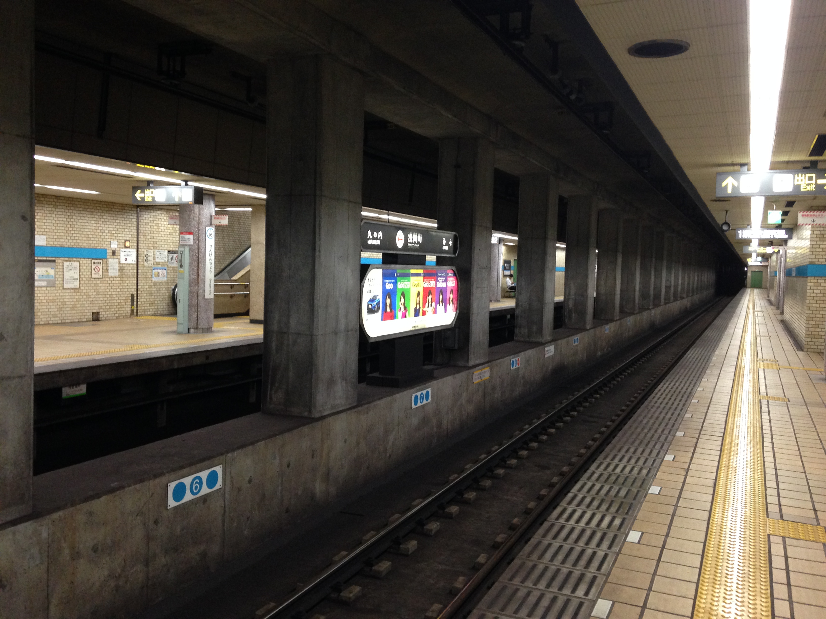 浅間町駅のホーム